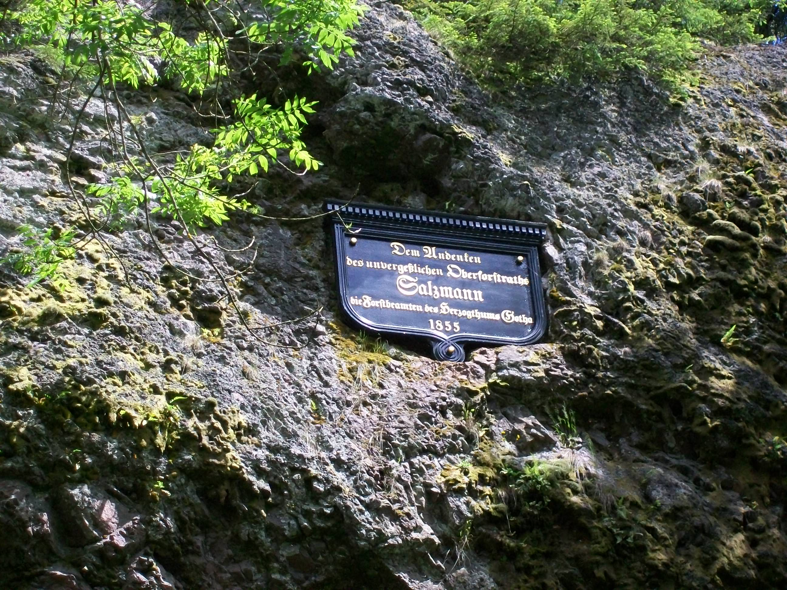 Gedenktafel am Triefstein bei Luisenthal (Thüringen) für den Oberforstrat Ernst Julius Theodor Salzmann (1792-1855)